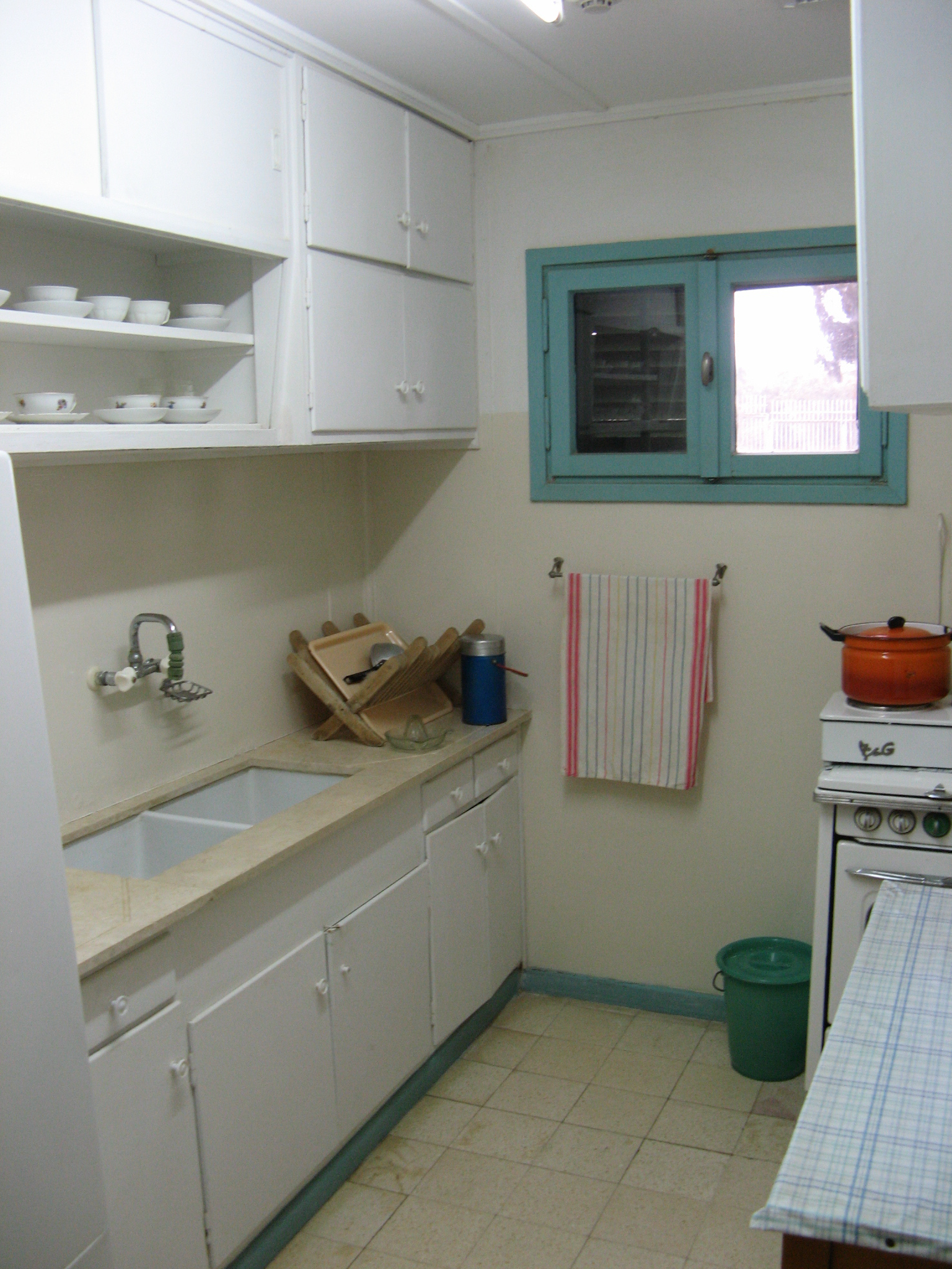 Kitchen in David Ben Gurion's shack in Sdeh Boker